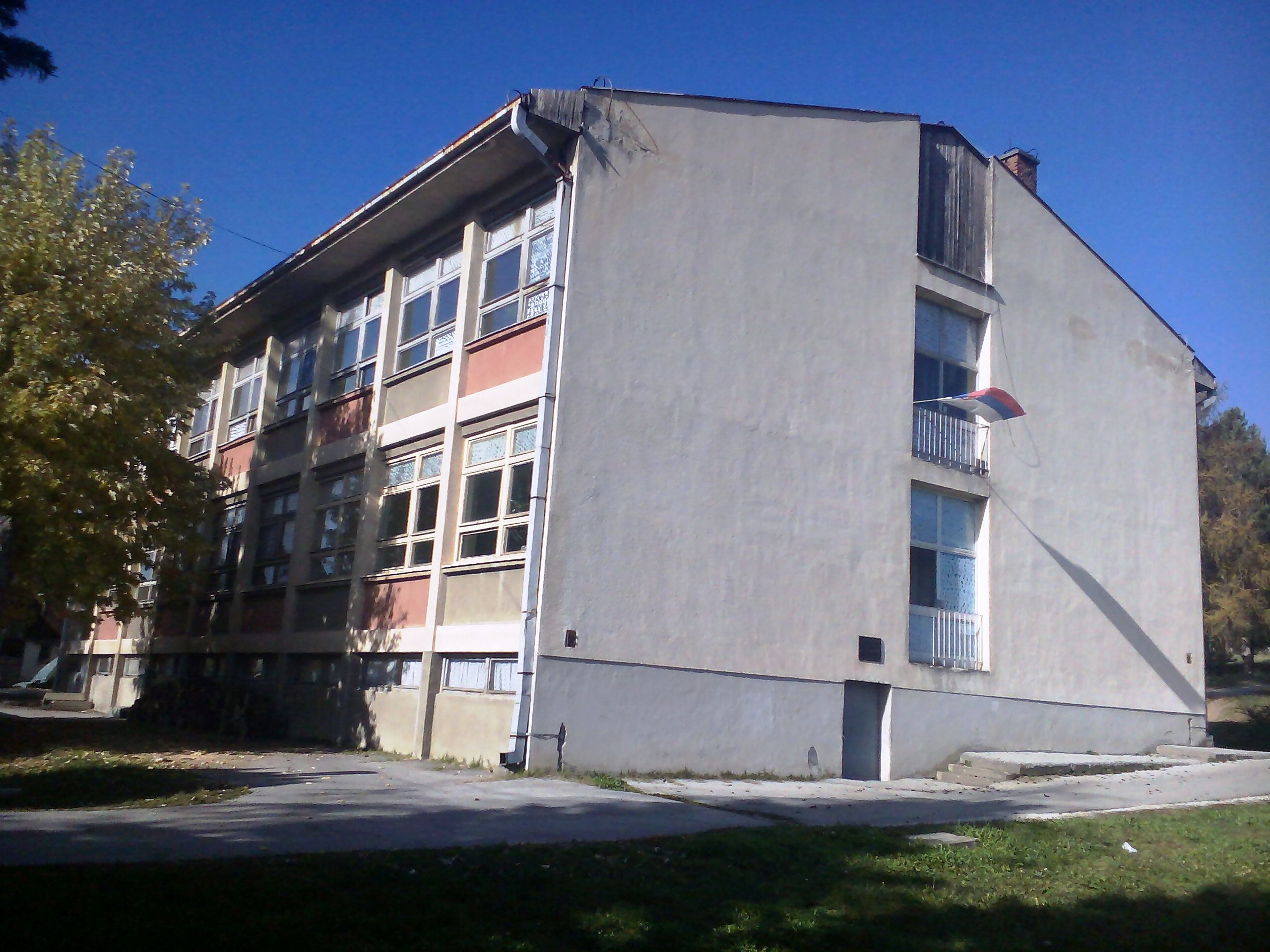 Школа у Багрдану